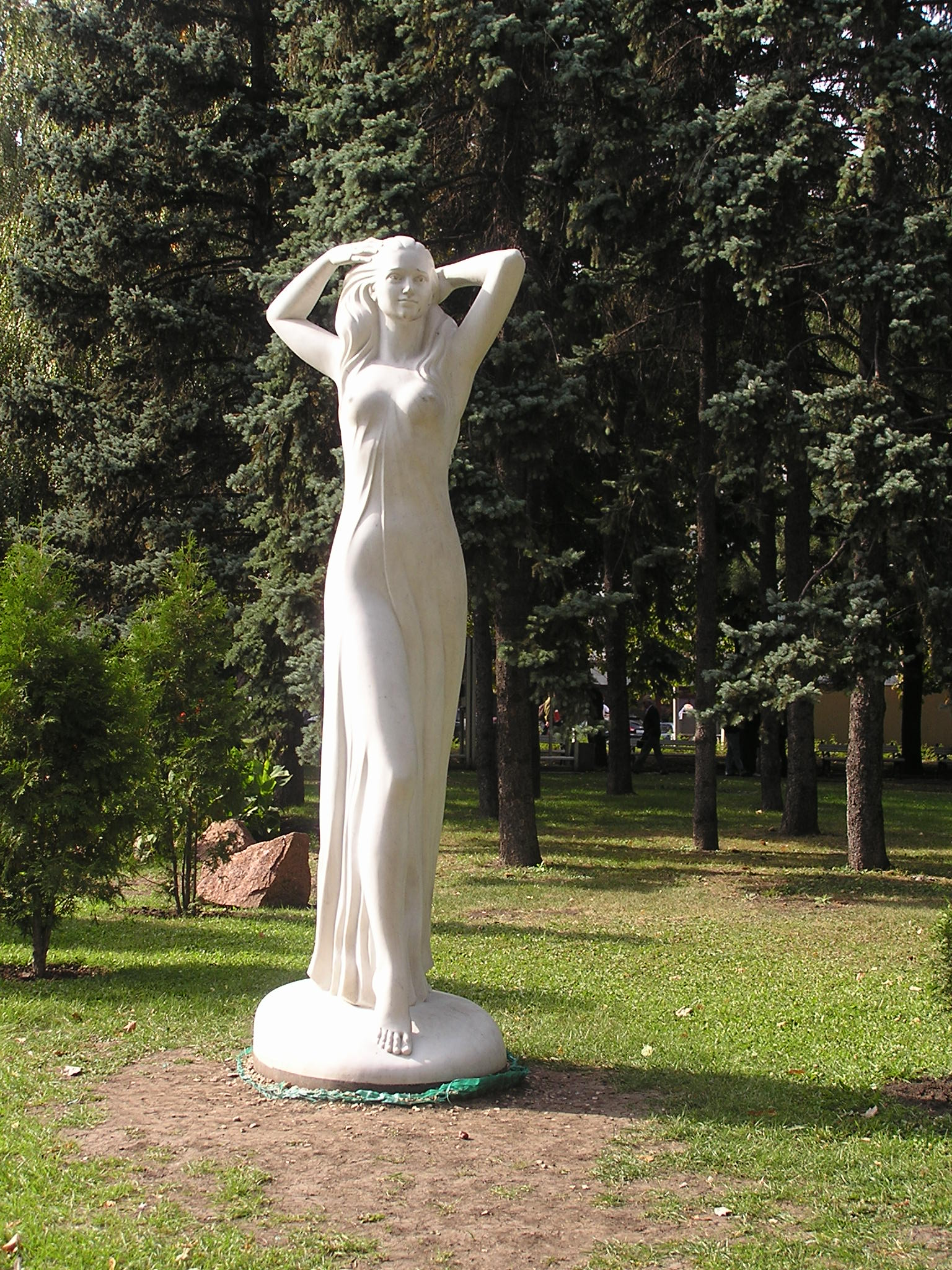 Площадь Ленина в Донецке